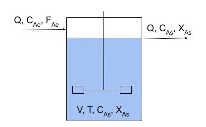 Nahaste perfektuko erreaktorea